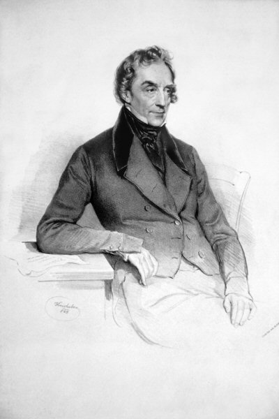 Carlo Balochino (1770-1851), Theaterdirektor (Scala, Kärntnertortheater). Lithographie von Josef Kriehuber, 1840